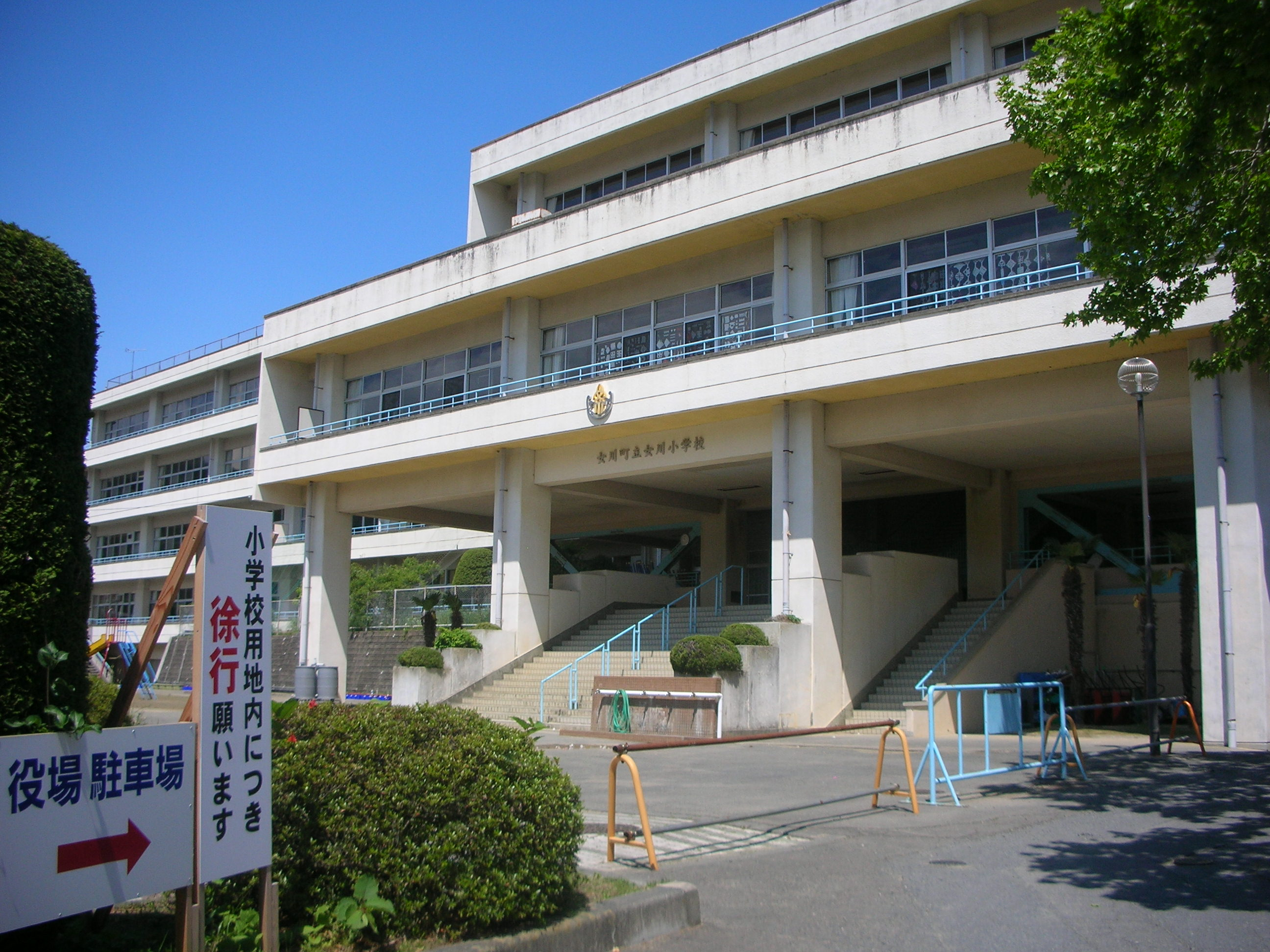 女川小学校校舎 2015年